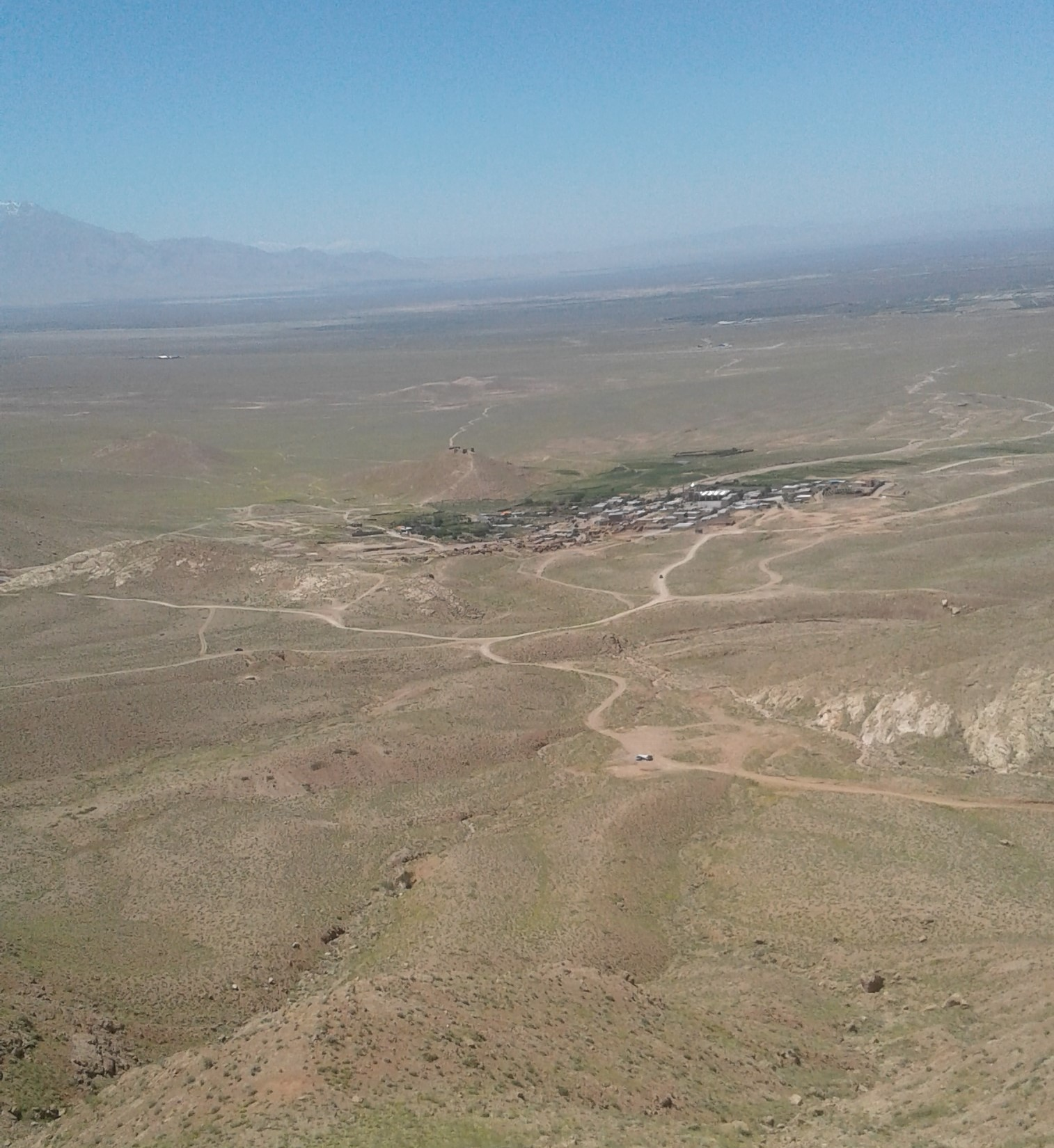 طبیعت روستای گجگین